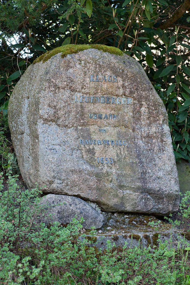 Gedenkstein an Klaus Leuenberger, einem Anführer des Bauernkriegs - bei der Ref. Kirche in Langnau im Emmental